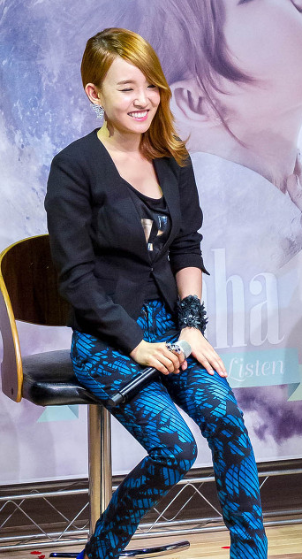 윤하 Just Listen 앨범 발매 쇼케이스 130502 촬영, 130827 게시 by Y-studio 달덩이 님